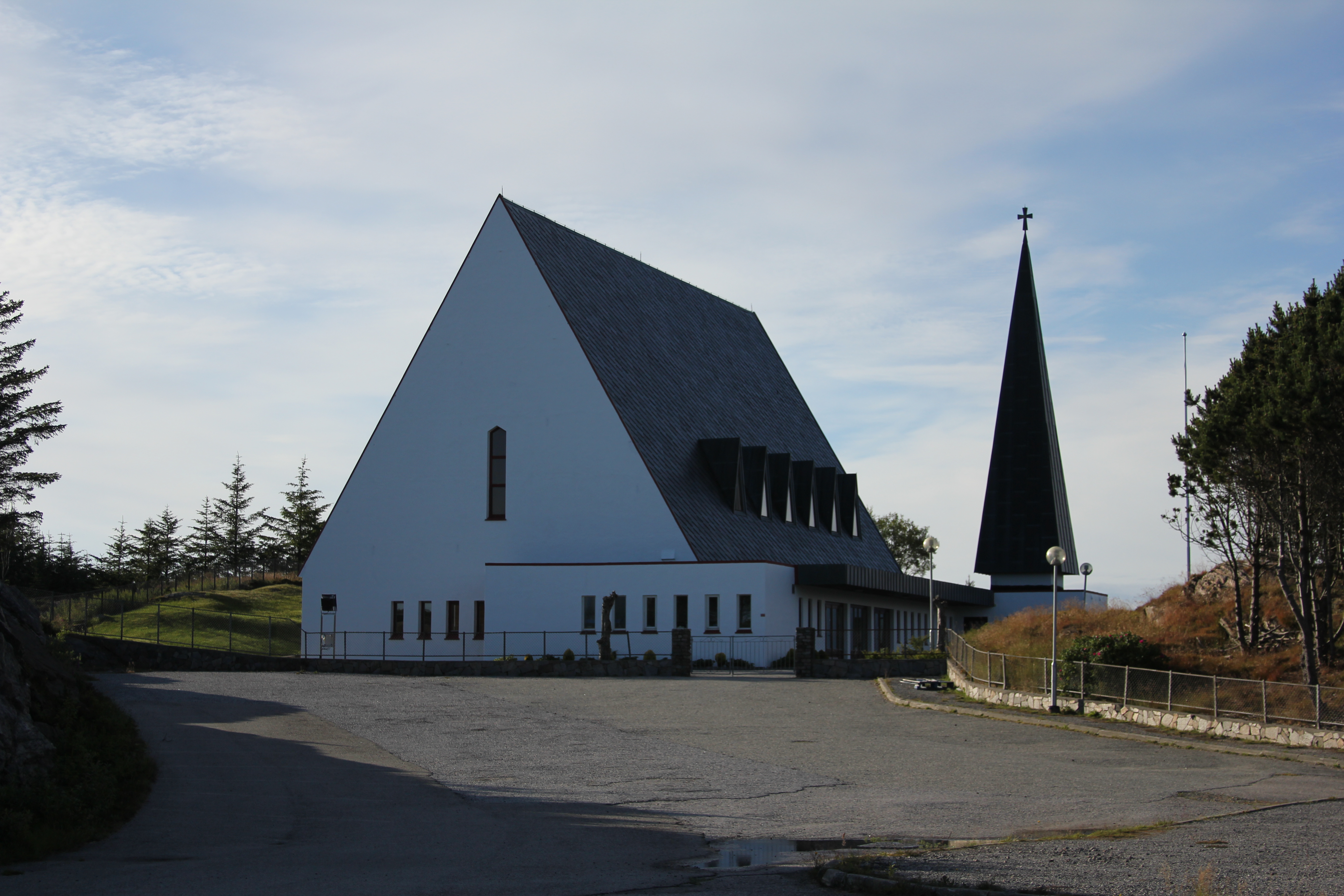 Hjelm church, Øygarden, Hordaland, Norway